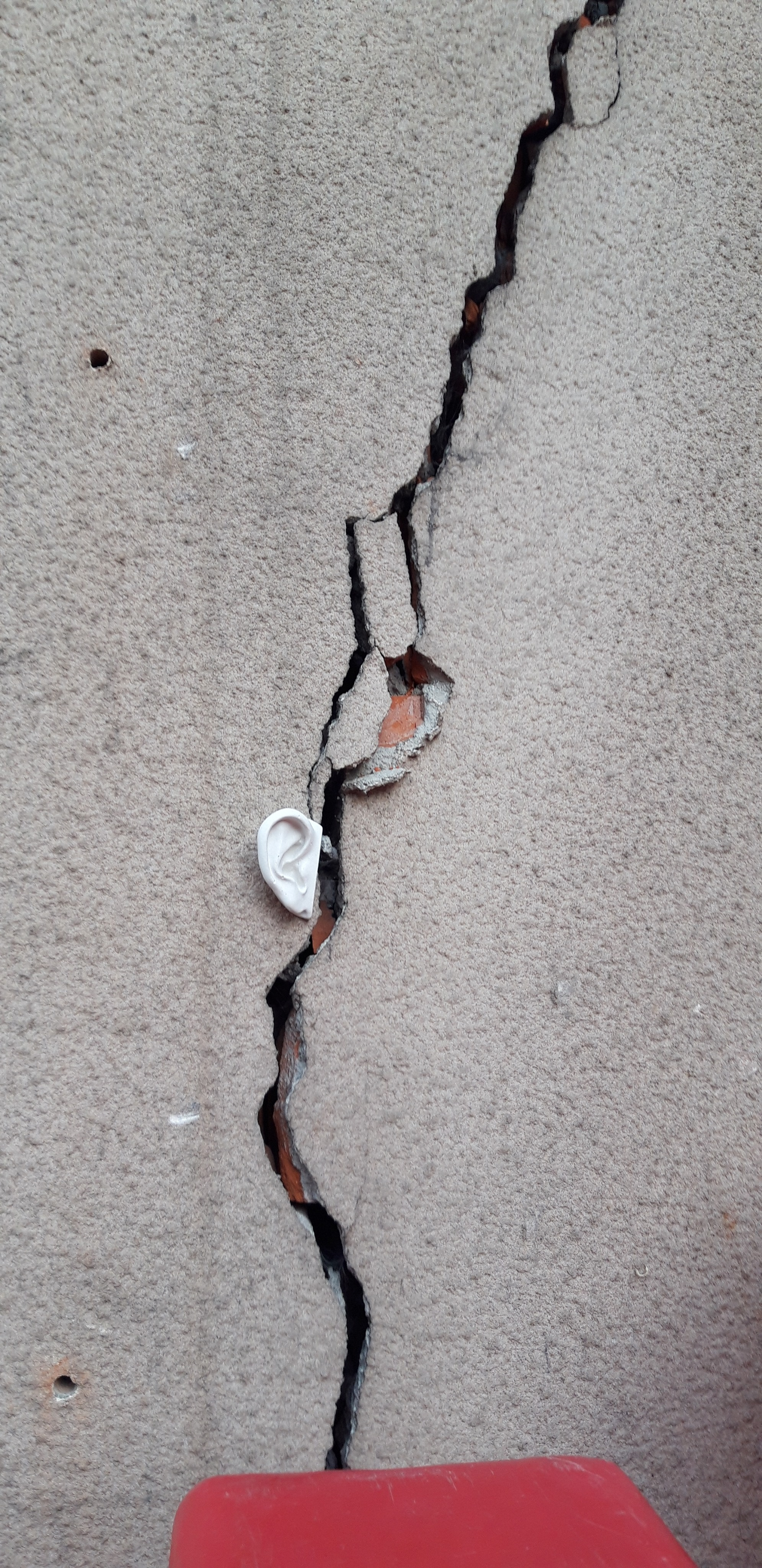 Маяна Ринатовна Насыбуллова. Стрит-арт проект "Родина Слушает", 2019